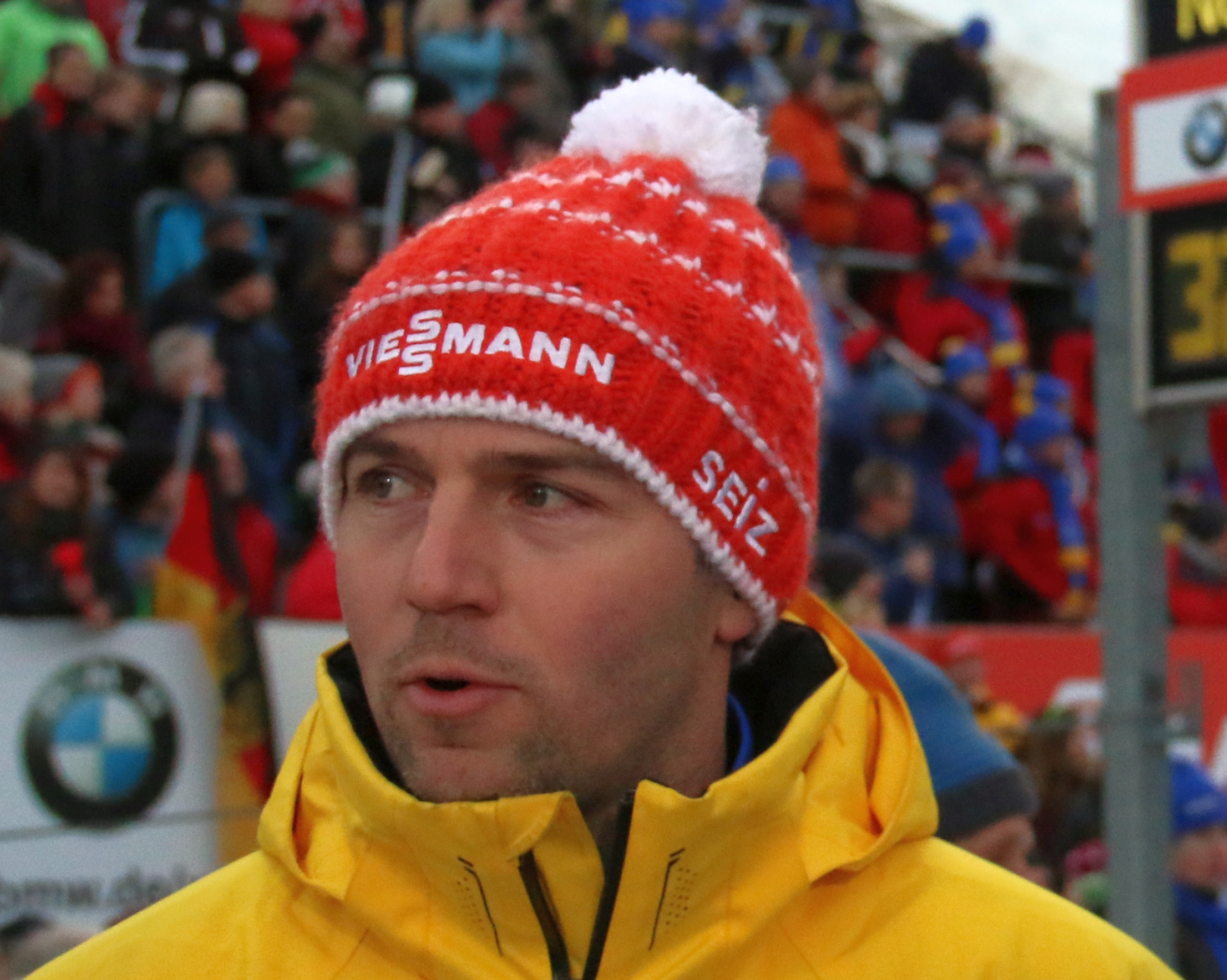 Jan Eichhorn und Claus Lufen beim Rennrodel-Weltcup 2017 in Oberhof